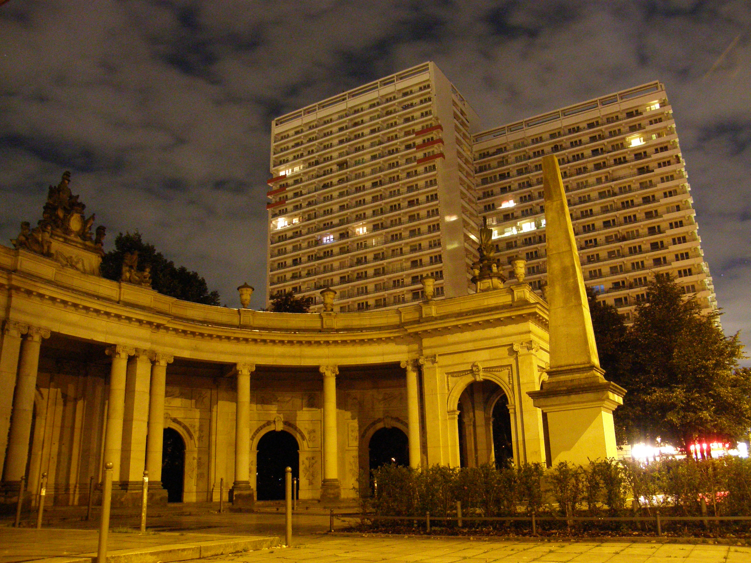 Berlin Dönhoffplatz mit Spittelkolonnaden + Meilenstein-Obelisk Null (nach Potsdam)